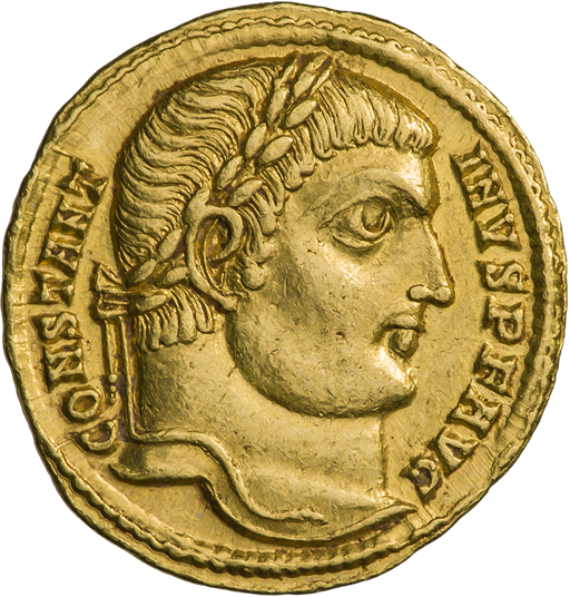 Солид. Константин I Великий. Ок. 324—325 гг. (аверс). Голова Константина I в лавровом венке, вправо.